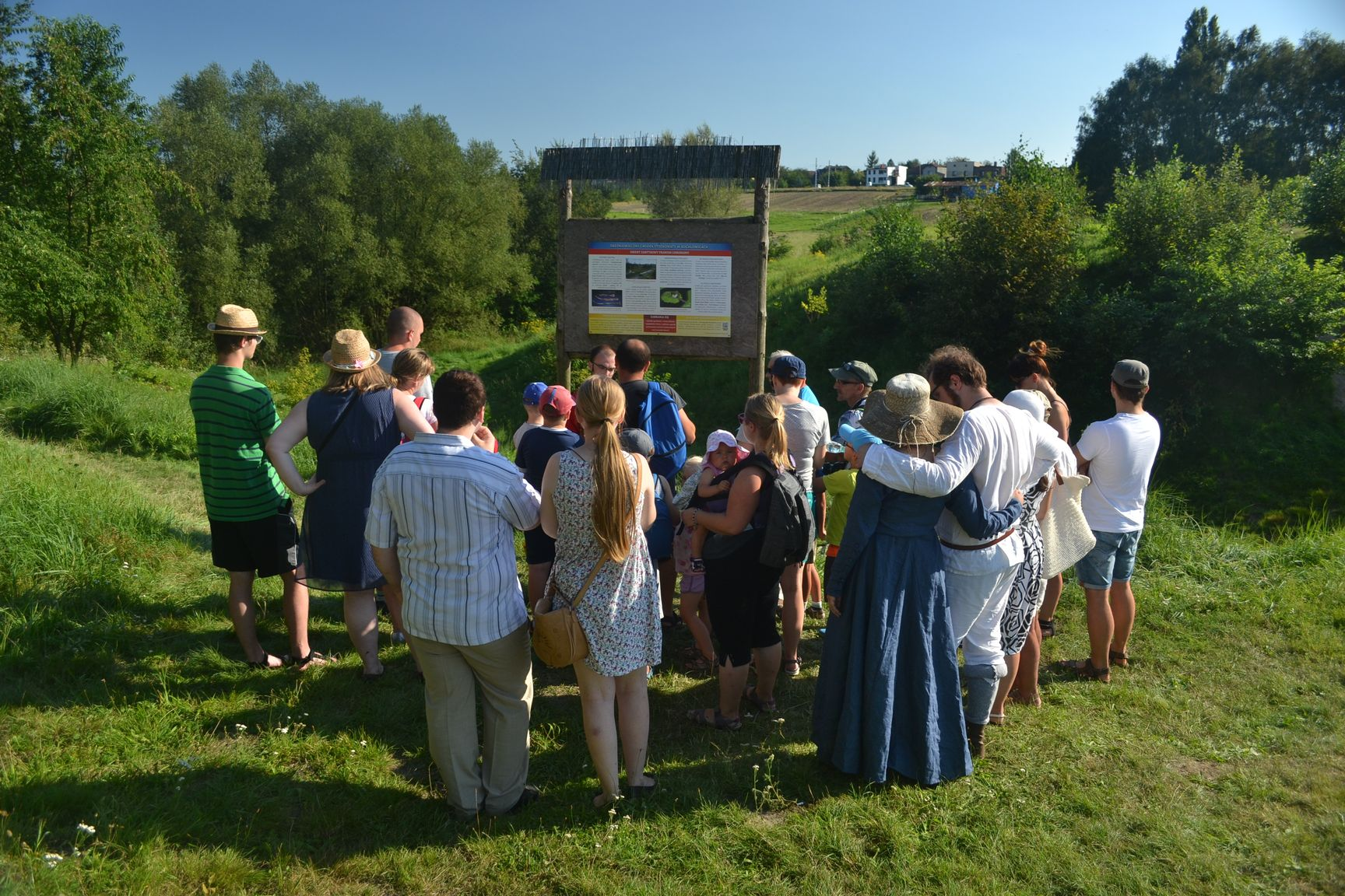 Wycieczka na gródku w Kochłowicach 2016